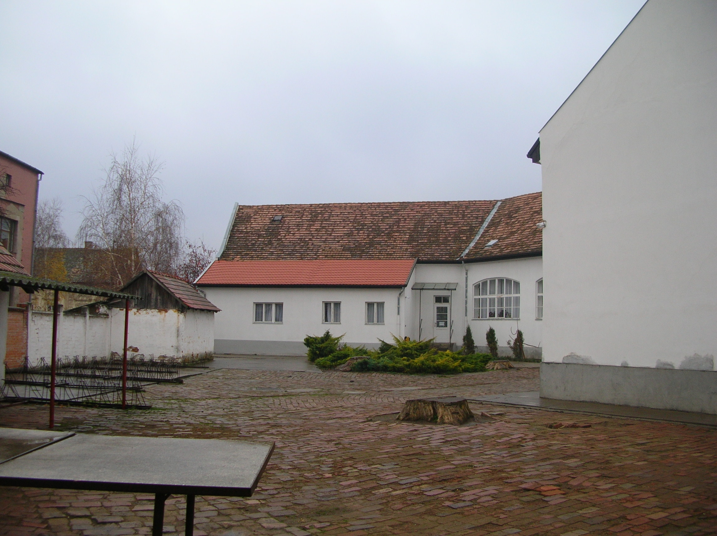 Makói Belvárosi Általános Iskola Alapfokú Művészetoktatási Intézmény és Logopédiai Intézet Bartók épülete